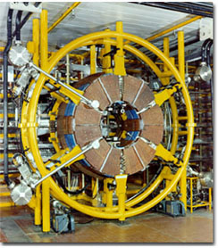 Immagine dell'esperimento reversed-field pinch ETA-BETA II, che opero' a Padova, Dipartimento di Ingegneria Elettrica di Via Gradenigo tra il 1979 e il 1989.